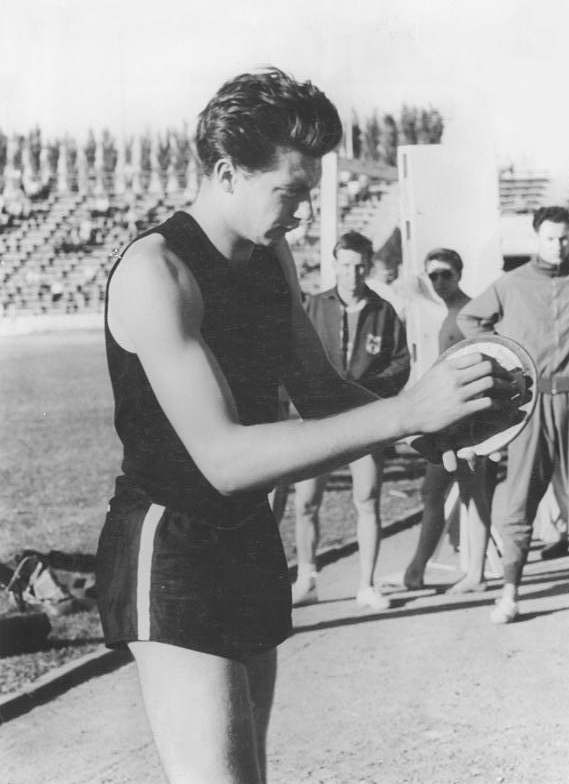 Milde Zentralbild Wendorf 24.06.1959 Leichtathletik-Abendsportfest im Jahn-Stadion. Am 24.06.1959 fand im Berliner Friedrich-Ludwig-Jahn Stadion ein Leichtathletik-Abendsportfest statt. In einige Disziplinen mußten noch Ausscheidungen für die Fahrkarte nach London durchgeführte werden. UBz: Beim Diskuswerfen konnte sich Milde den zweiten Platz und damit die Fahrkarte nach London erkämpfen.